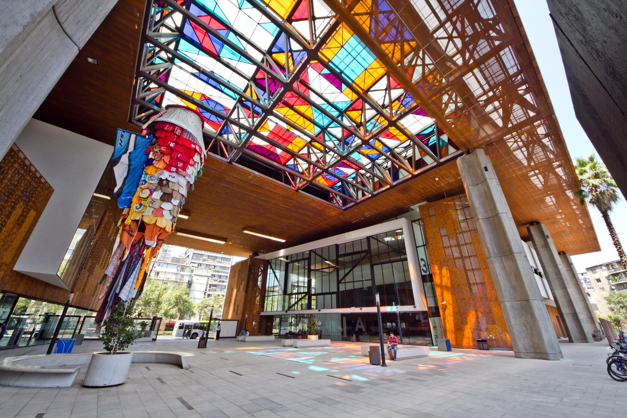 Centro Gabriela Mistral-002